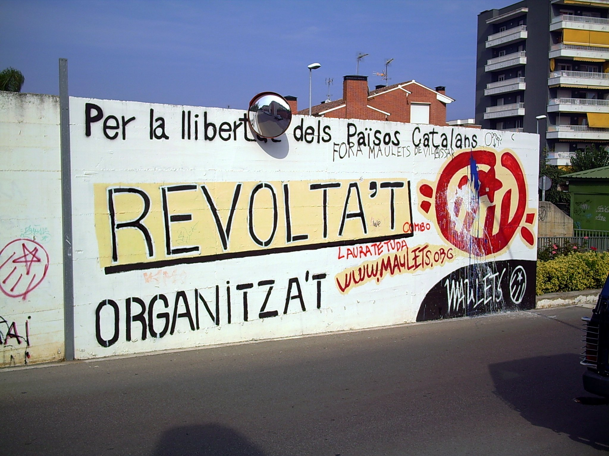 Grafitti pels Pïsos Catalans - a Vilassar de Mar